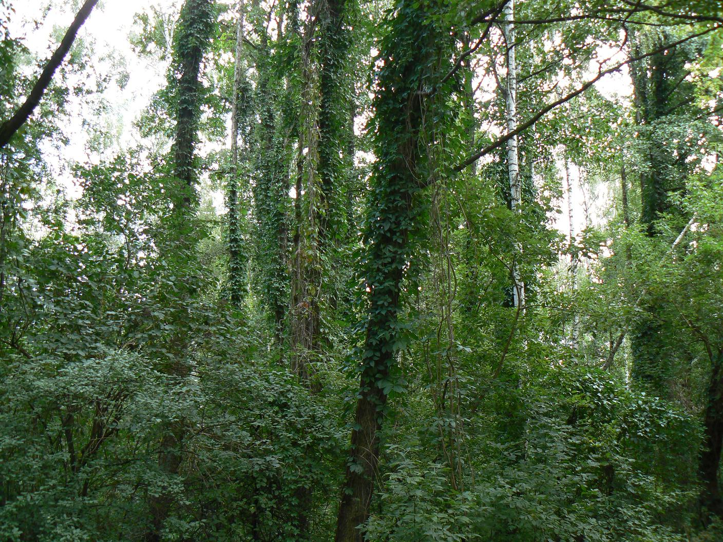 las w między miastem Mińsk Mazowiecki a wsią Gliniak